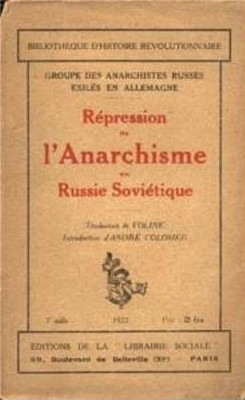 Répression de l'anarchisme en Russie soviétique - 1923 - traduction Voline